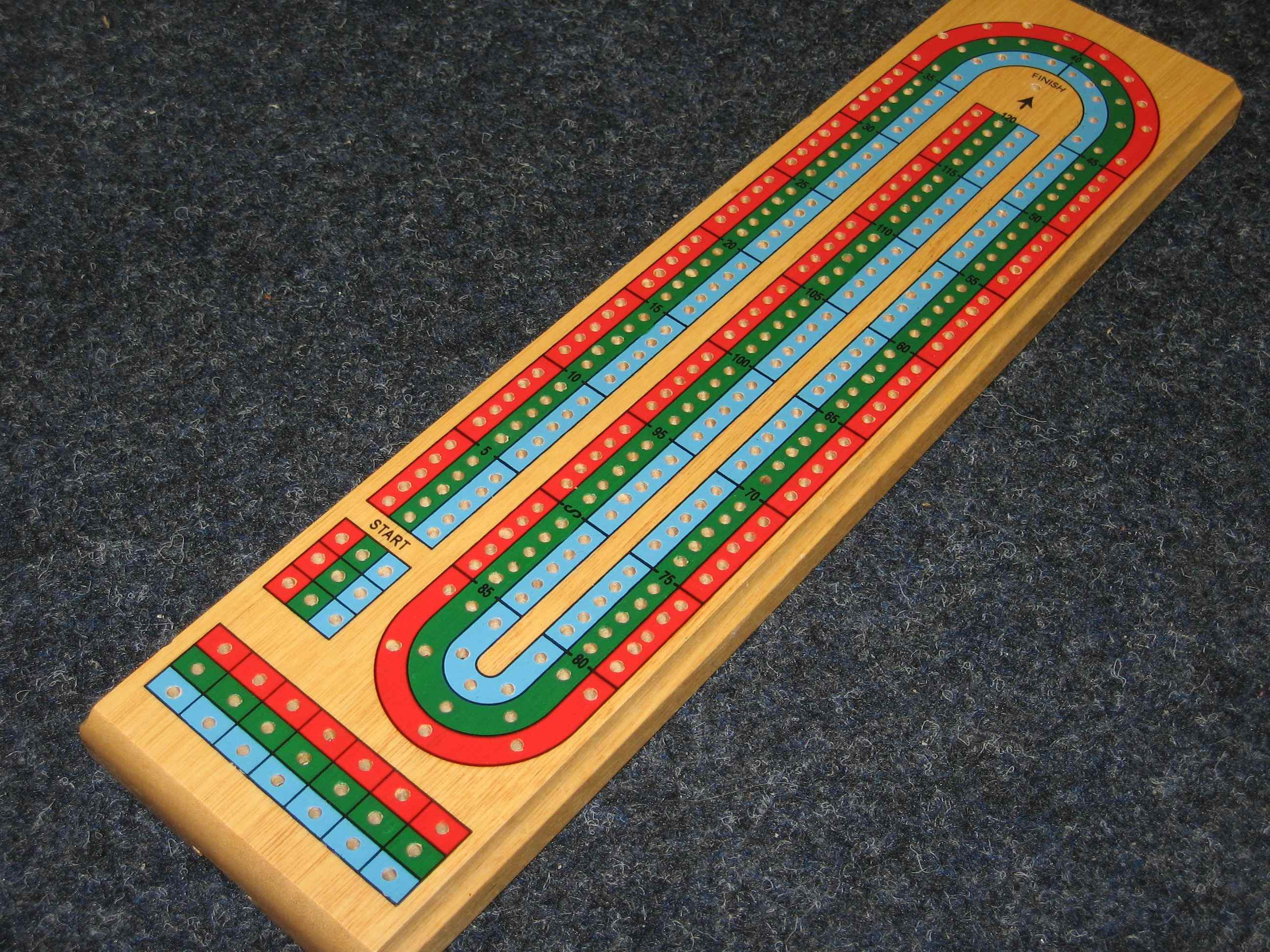 120-Loch-Cribbage-Brett